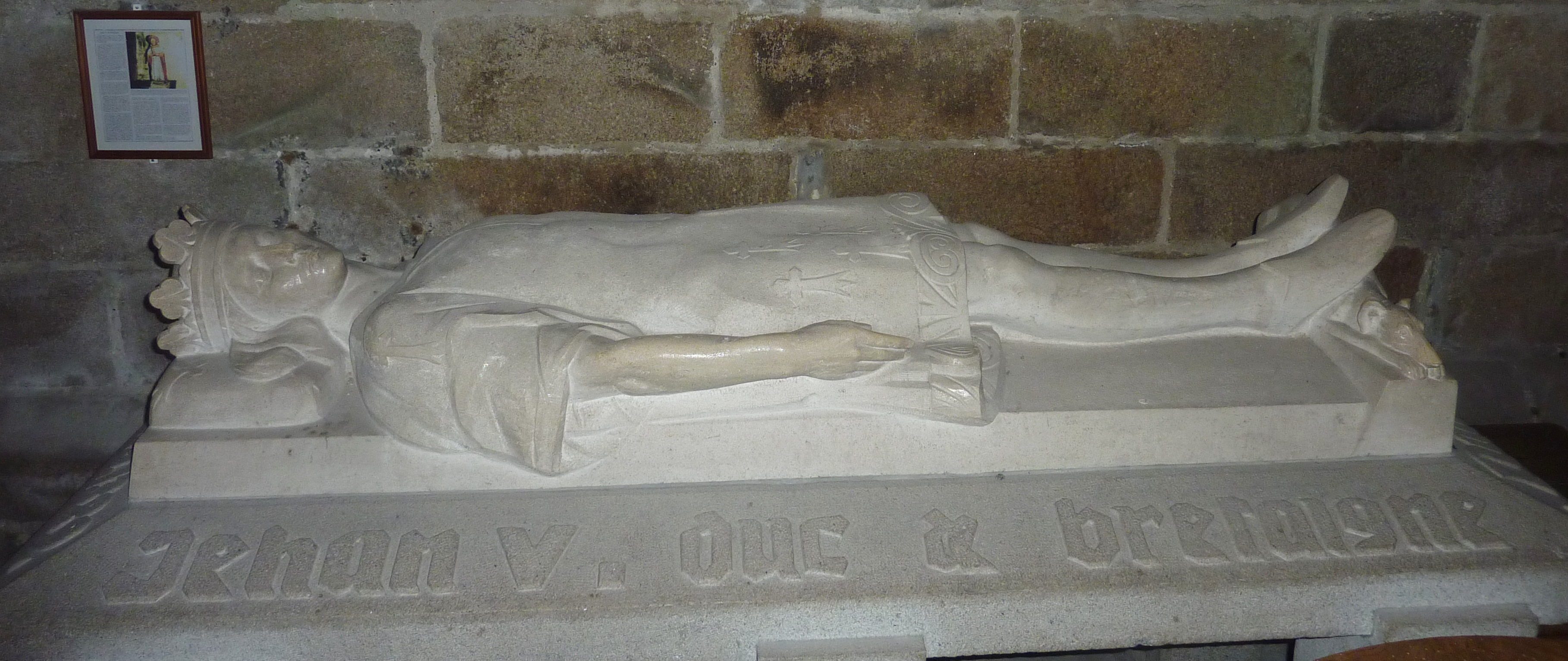 Cathédrale Saint-Tugdual de Tréguier : enfeu de Jean V de Bretagne.